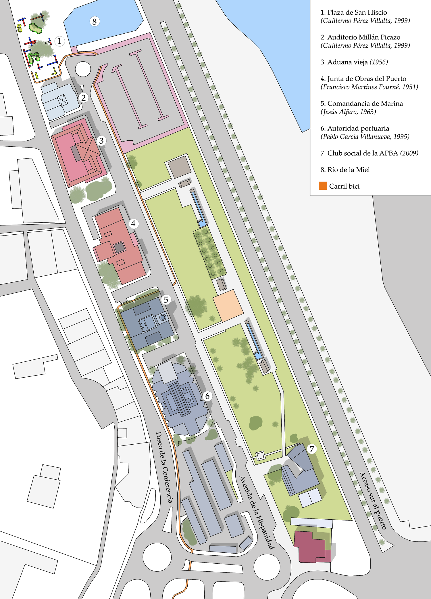 Plano situación del parque de la Conferencia en la Villa Vieja de Algeciras, Andalucía, España